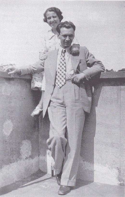 חולדה קאסוטו ושאול קמפניינו לפני נישואיהם, קיץ תרצ"ז – 1937. (מתוך: "לדור אשר לא ידע" )